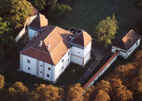 Mágochy–Alaghy–Sennyei-kastély és parkja This is a photo of a monument in Hungary. Identifier: 3026